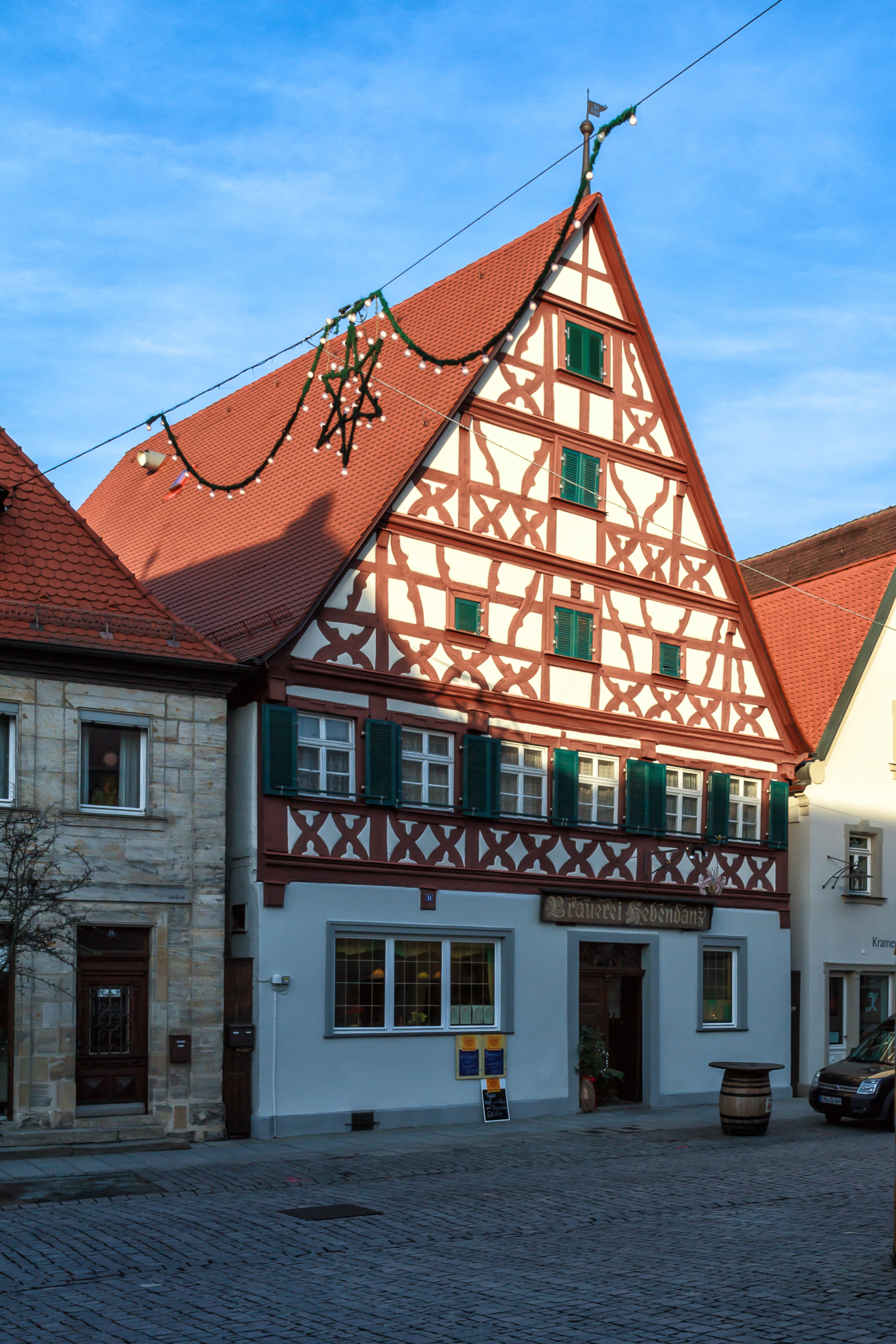 Forchheim - Brauerei Hebendanz - 2012